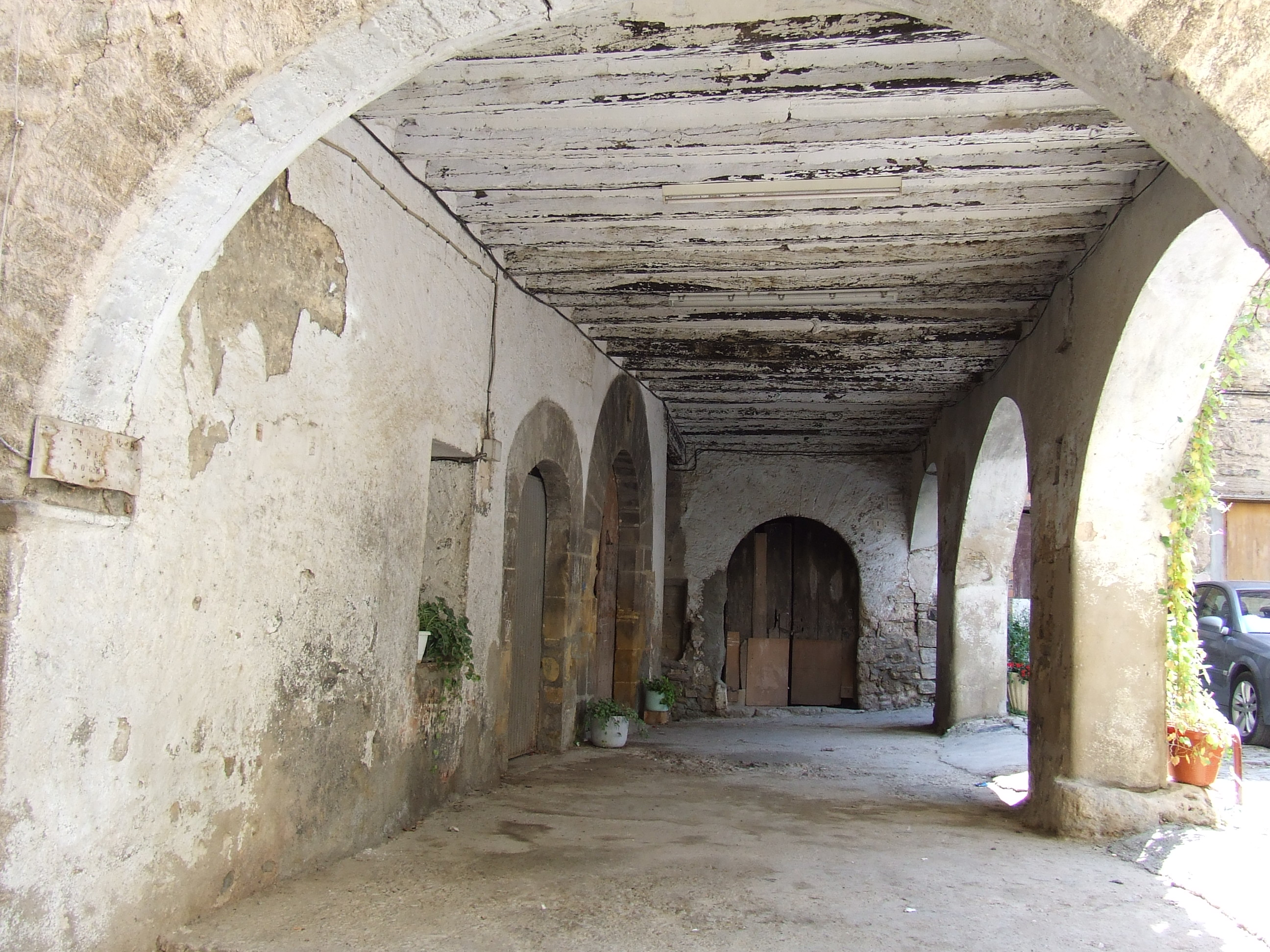 Detall dels porxos de la Plaça Major de Figuerola d'Orcau